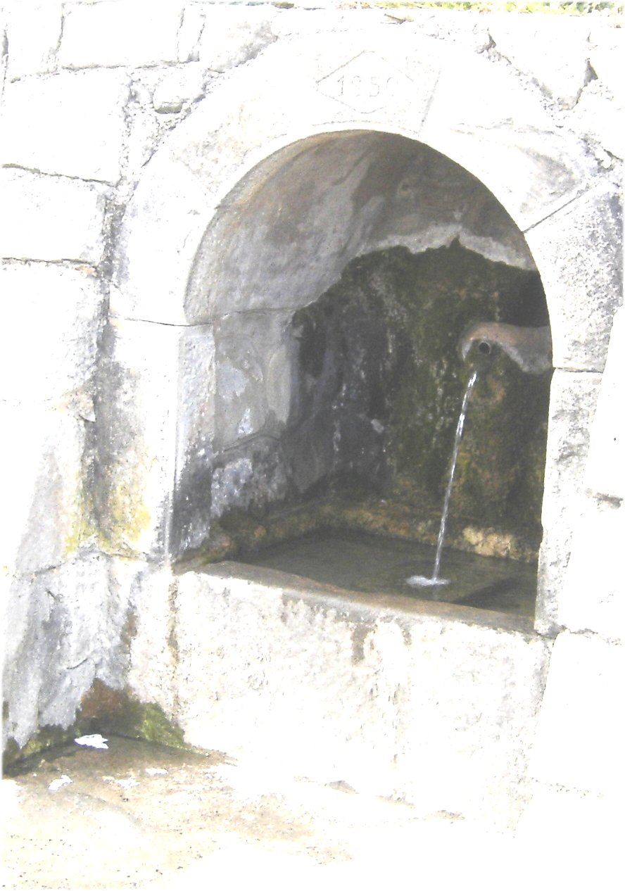 L'interior del nínxol de la font de Coll de Jou, a Guixers (Solsonès)